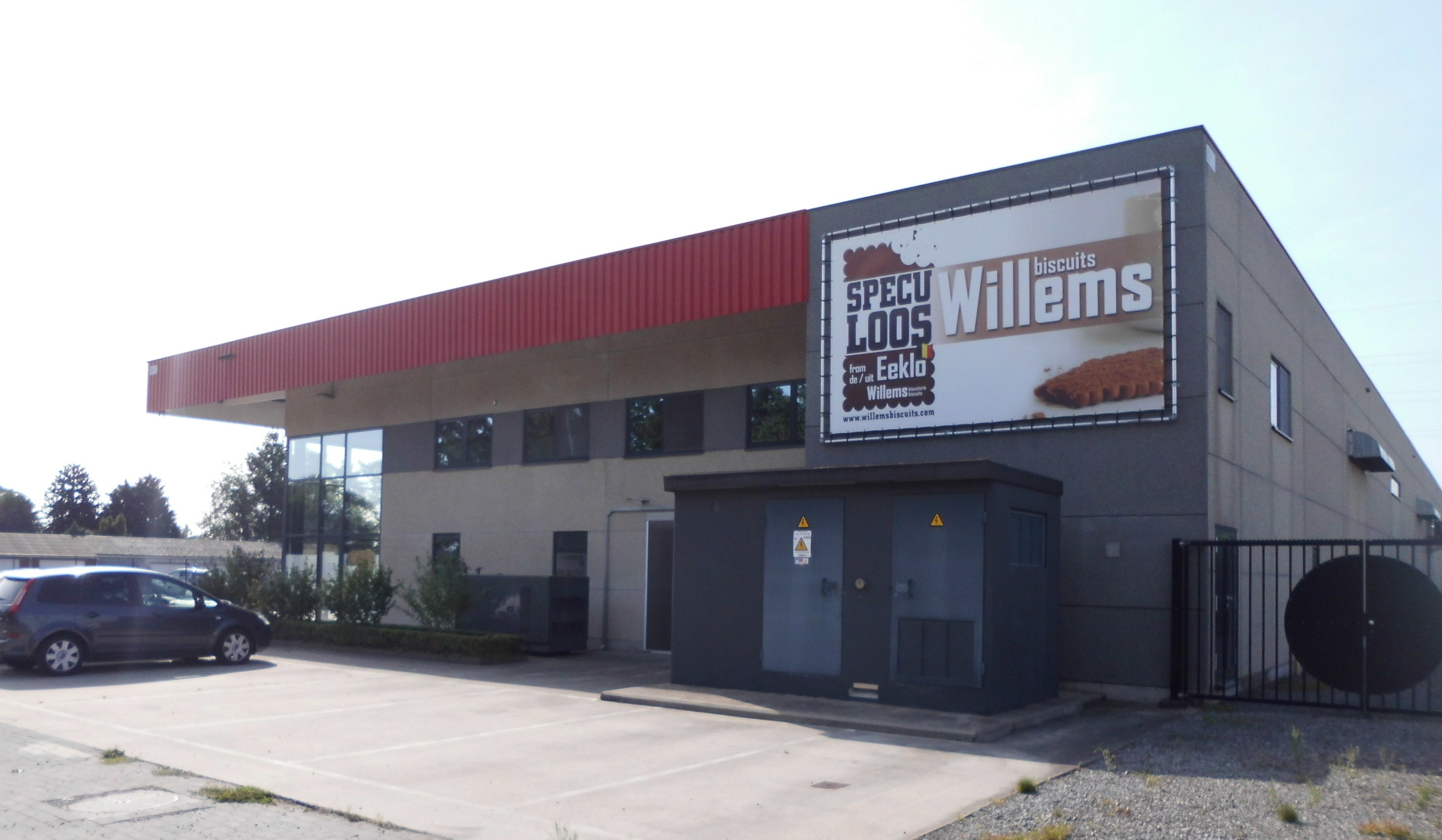 Willems Biscuits - Industriezone Nieuwendorpe - Eeklo - Oost-Vlaanderen - België. Willems Biscuits is eigendom van Lotus Bakeries uit Lembeke - Oost-Vlaanderen - België